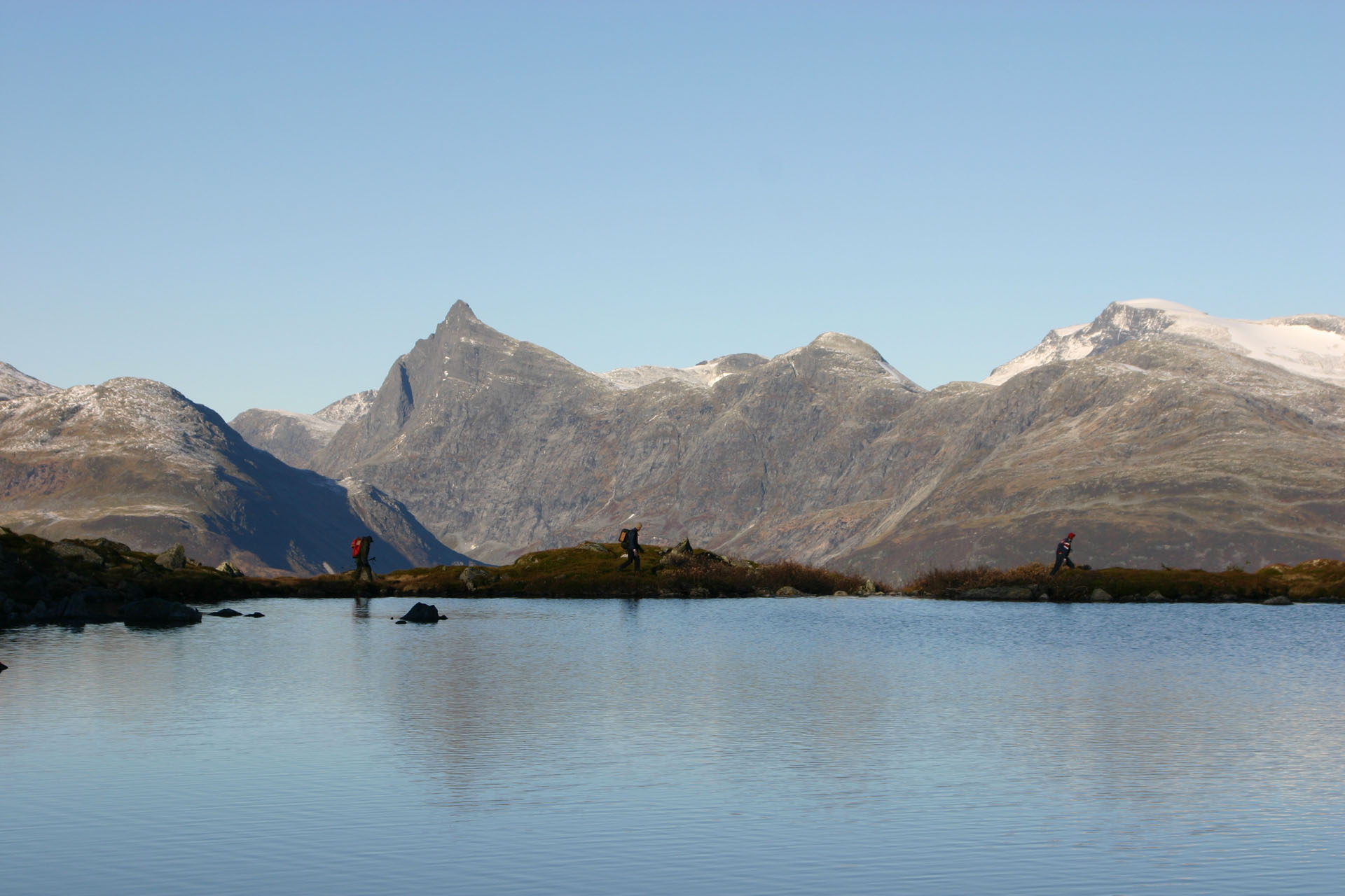 Utsikt mot Hornindalsrokken fra Kupa (Lisjekupa)